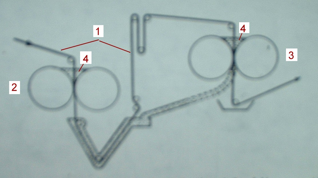 Schema:Färbefoulard